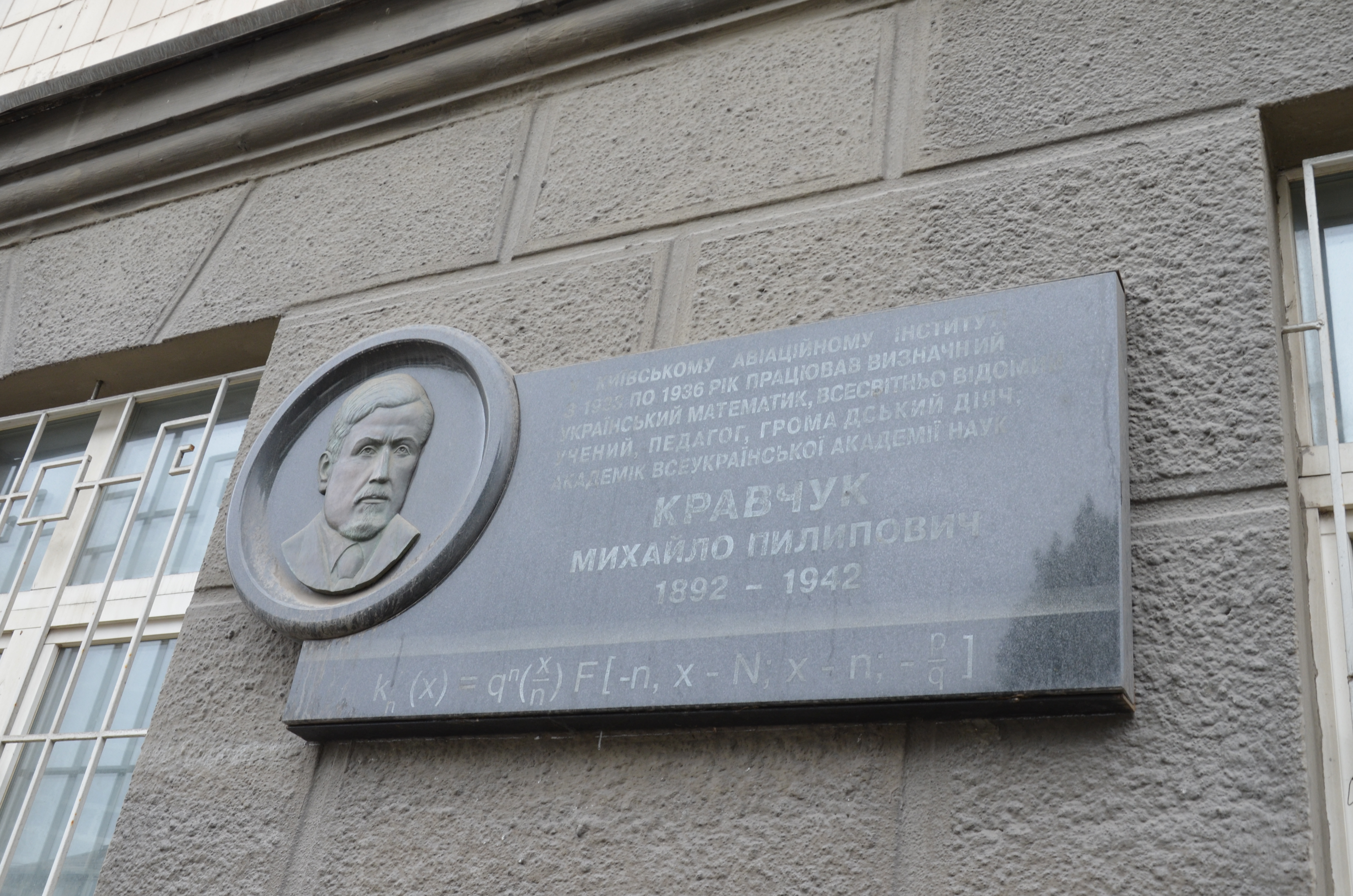 Будинок київського авіаційного інституту, в якому в якому працював В. М. Челомей, вчений у галузі механіки, академік; навчалися та працювали відомі вчені науки і техніки, Київ, Комарова Космонавта пр-т, 1